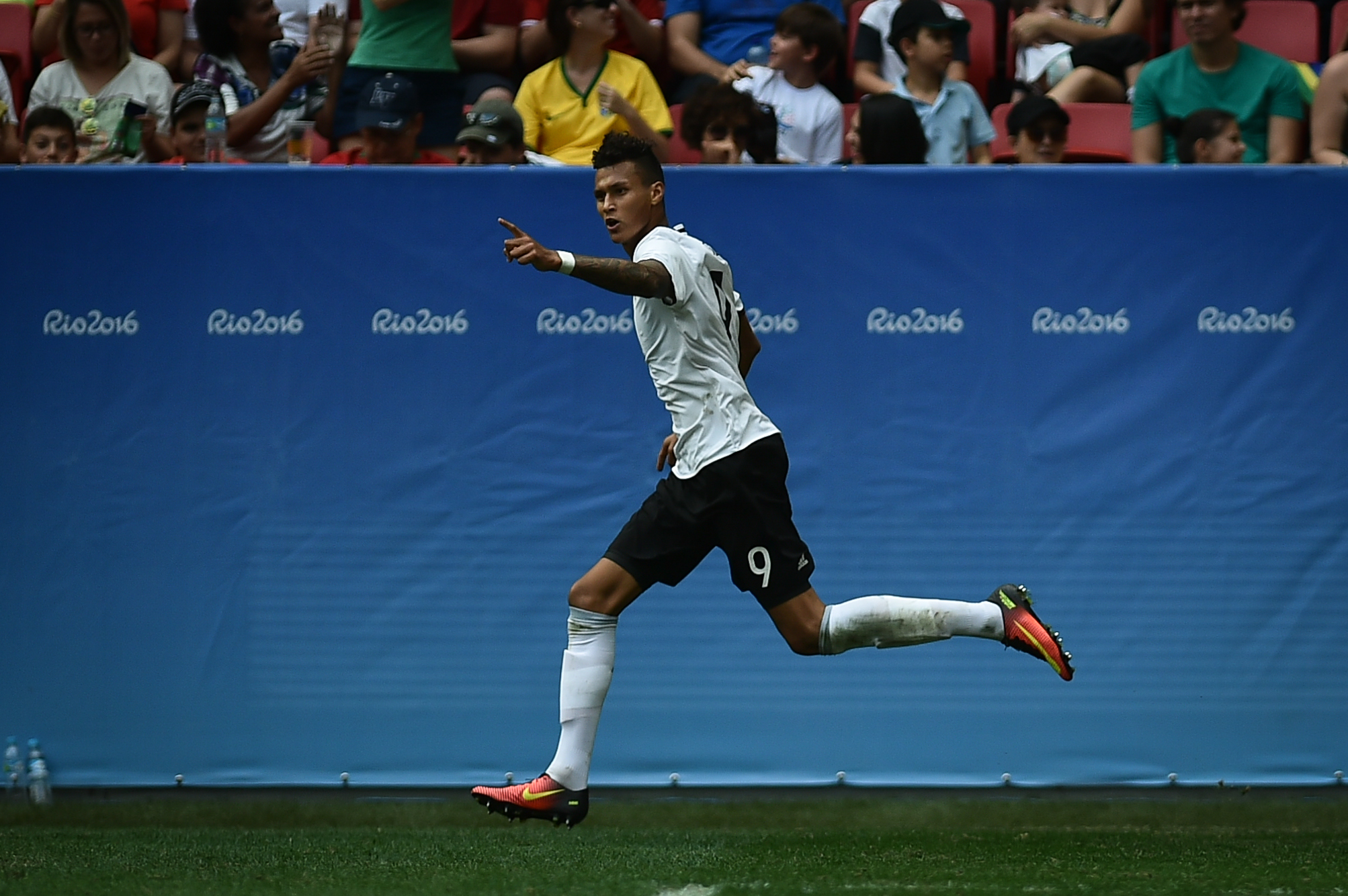 Estádio Nacional de Brasília Mané Garrincha, Brasília, DF, Brasil, 13/8/2016 Foto: Andre Borges/Agência Brasília Portigal e Alemanha jogam neste sábado (12), no Estádio Mané Garrincha, pelas quartas de final do futebol masculino nas Olimpíadas 2016.